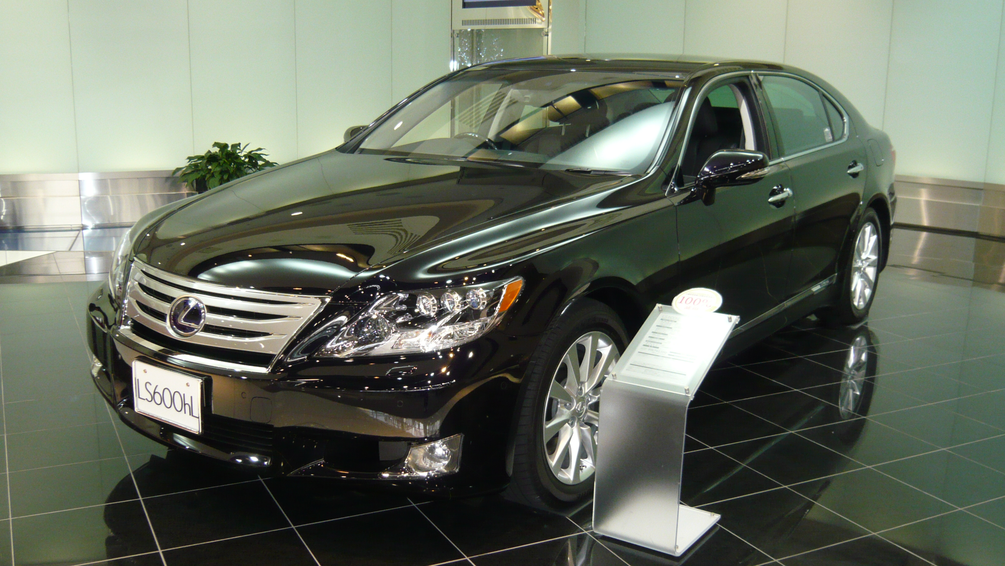 Lexus LS600hL 2010